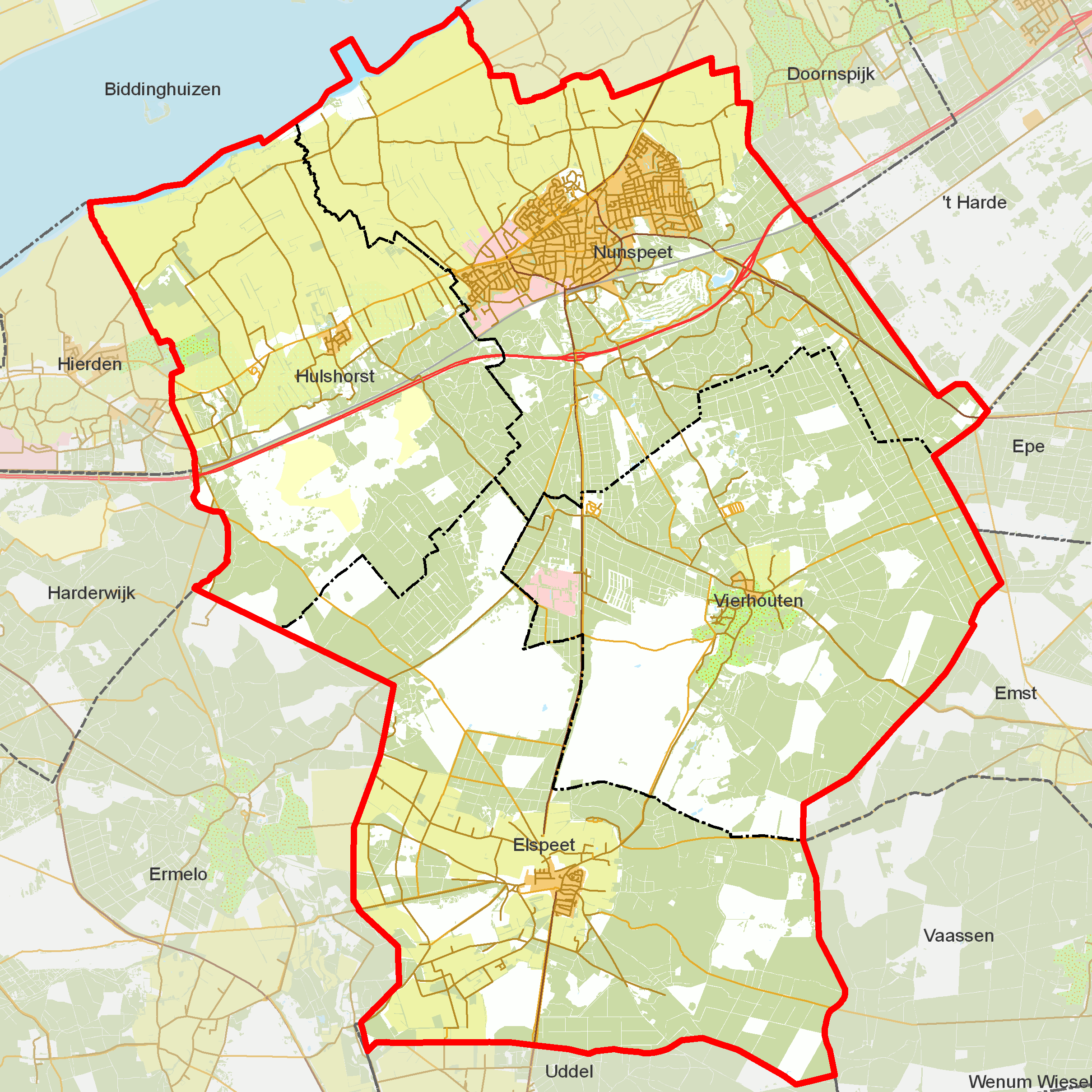 BAG woonplaatsen - Gemeente Nunspeet.png